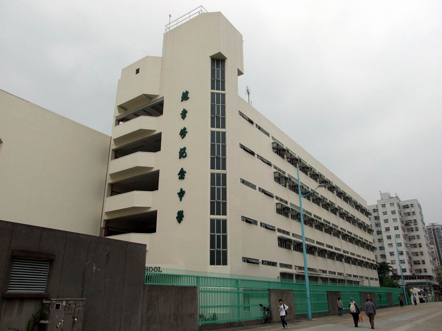 趙聿修紀念中學